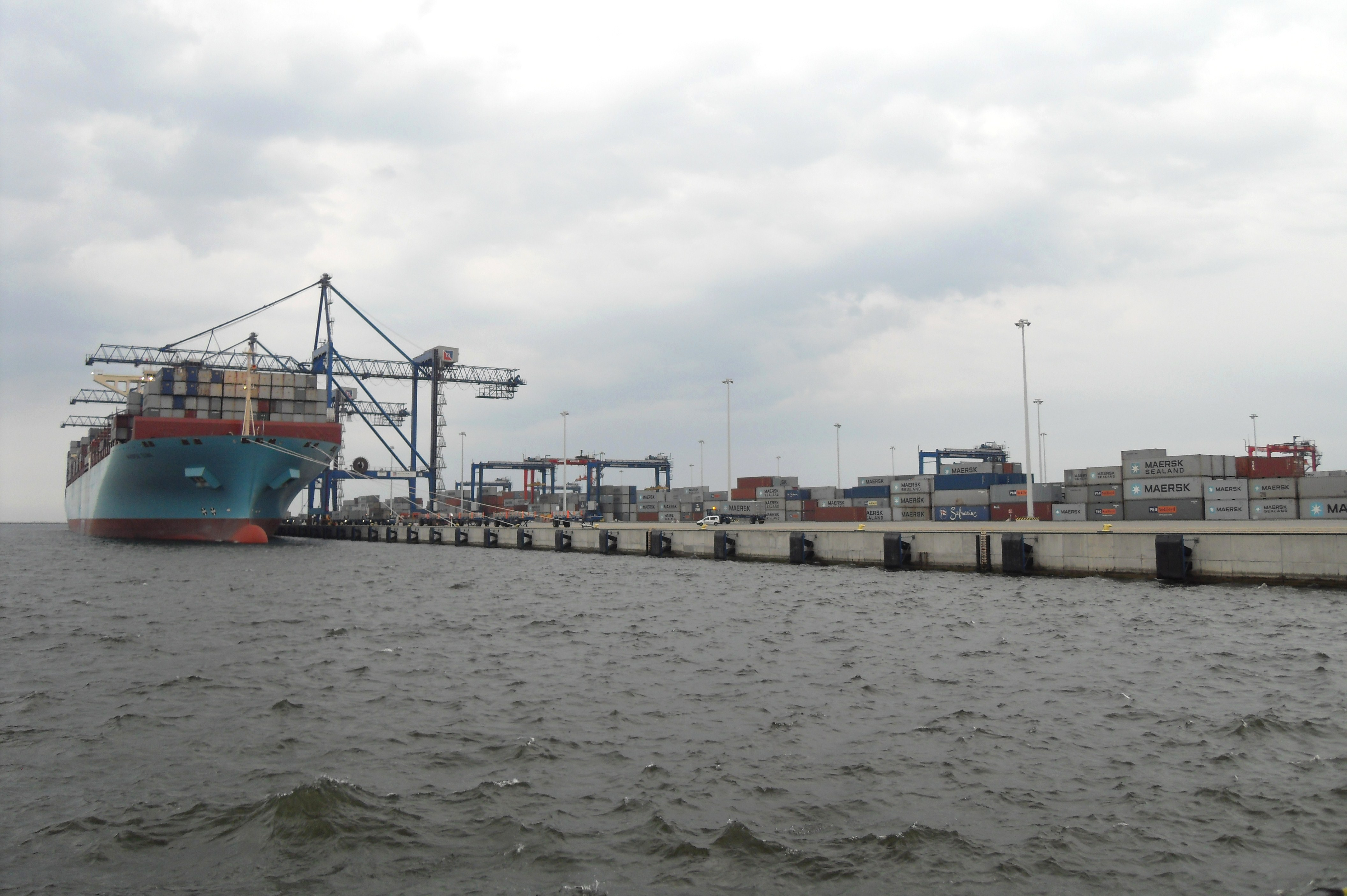 Terminal kontenerowy DCT Gdańsk i Maersk Elba.